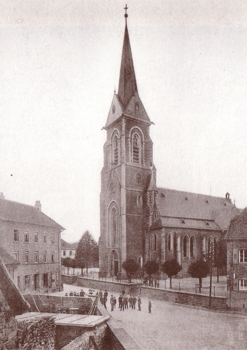 Katholische Pfarrkirche St. Michael (Aschaffenburg-Damm) Außenansicht vor 1900